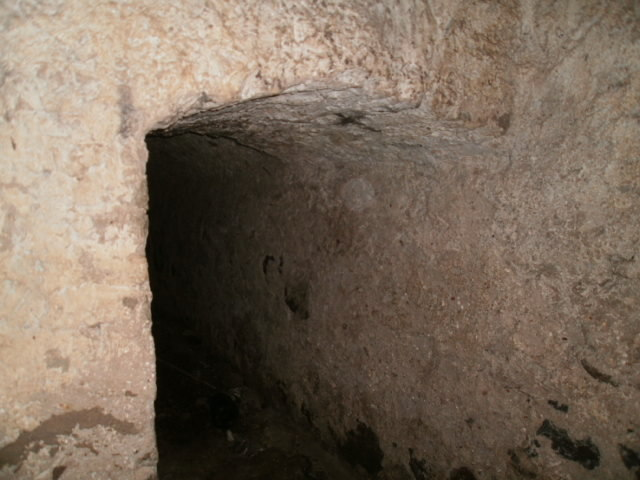 Ukseava keldrikorrusel tornialusesse kinnimüüritud käiku.